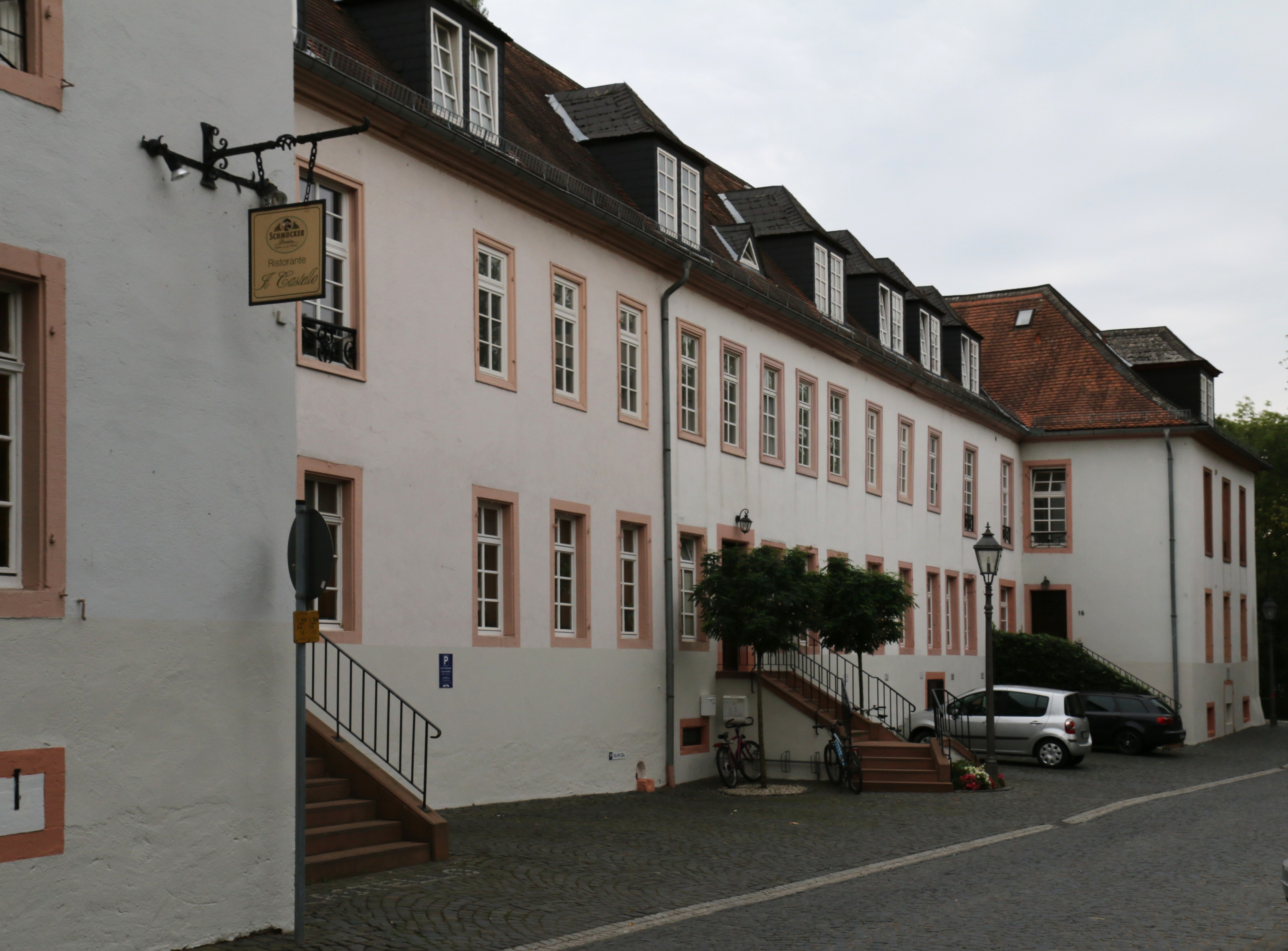 Dieburg, Albinischloss vom Innenhof her gesehen